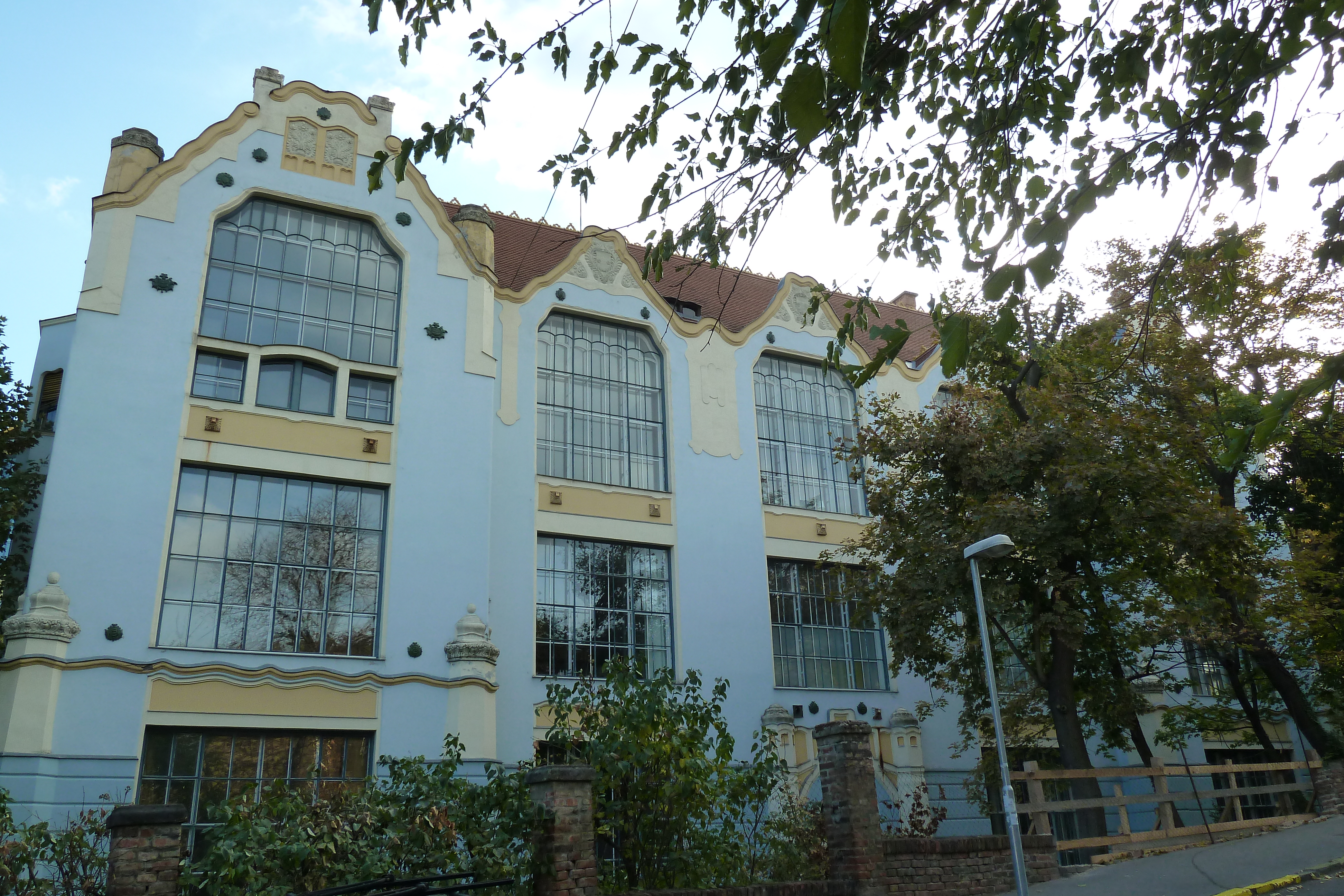 Ház (Budapest 11, Kelenhegyi út 12-14.) This is a photo of a monument in Hungary, Identifier: 1105